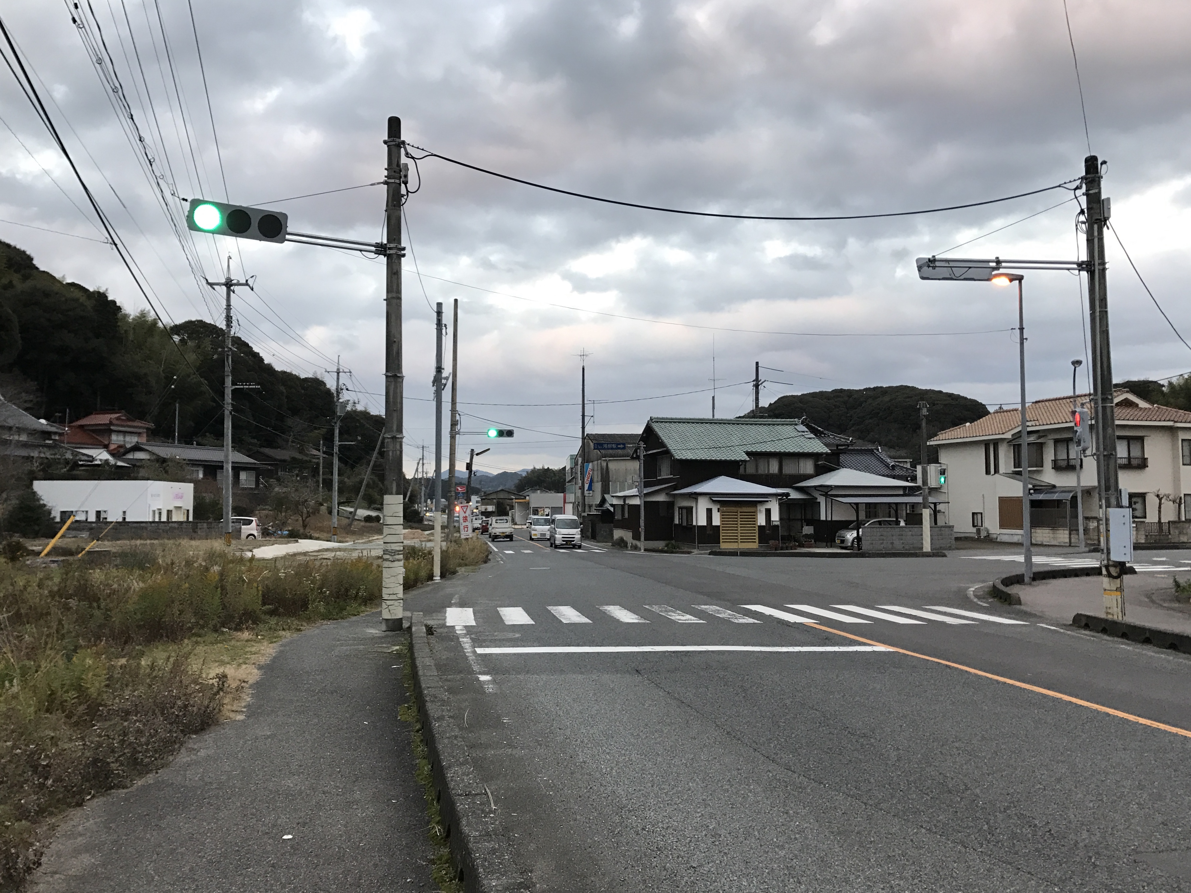 滝部駅前の山口県道39号